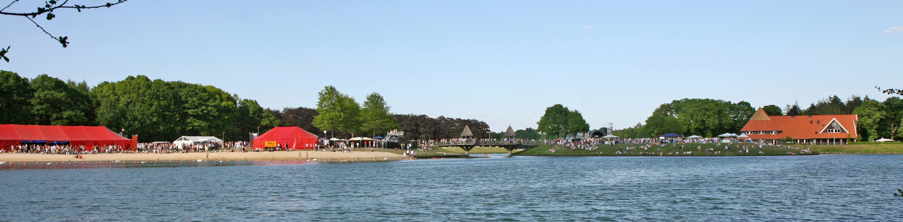 Het Hulsbeek, popparty